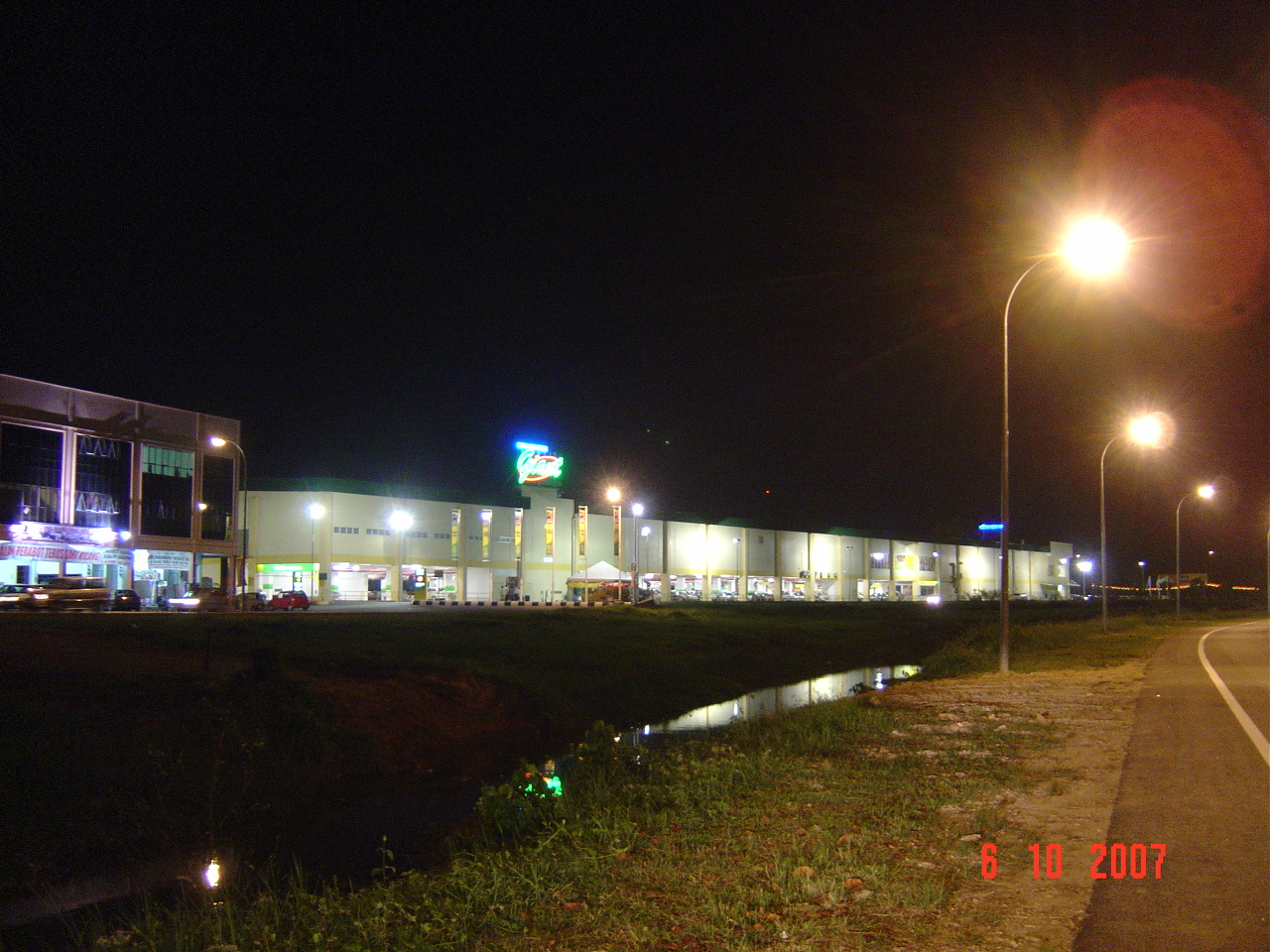 Author: Lim Thiam Poh Year:2007 Title: Giant Muar